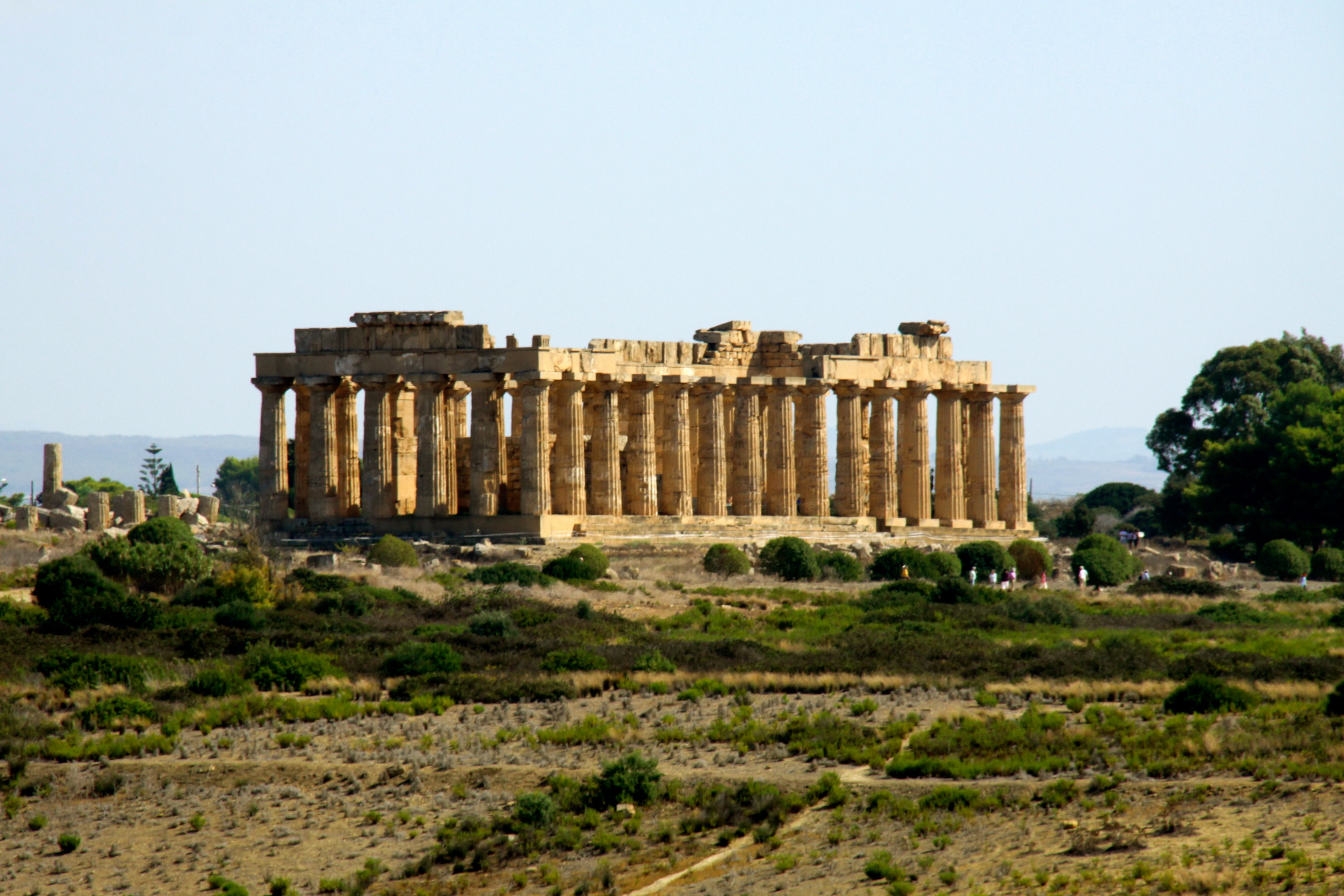 Temple E (Selinunte)